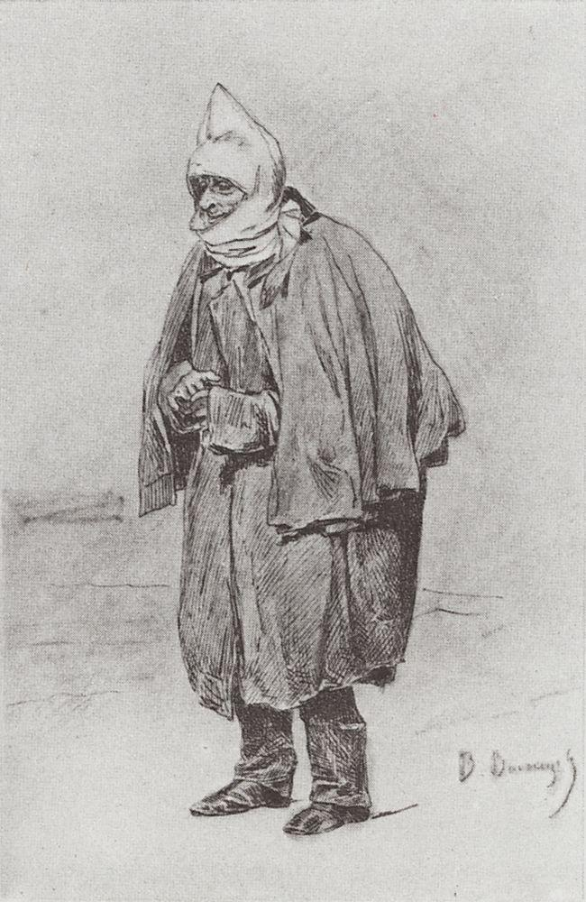 Заштатный